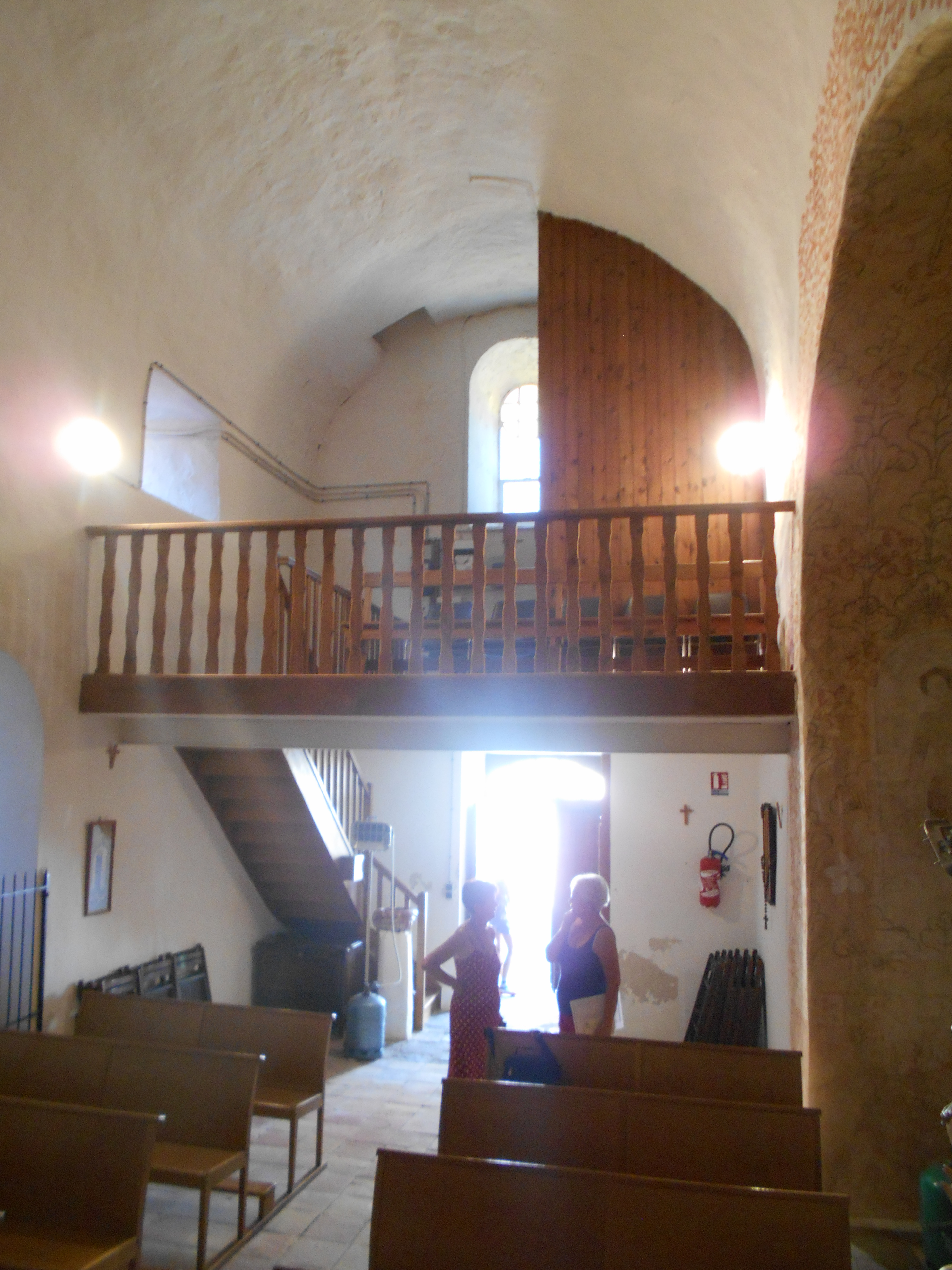 Sant Andreu de Tarerac. Peus de la nau